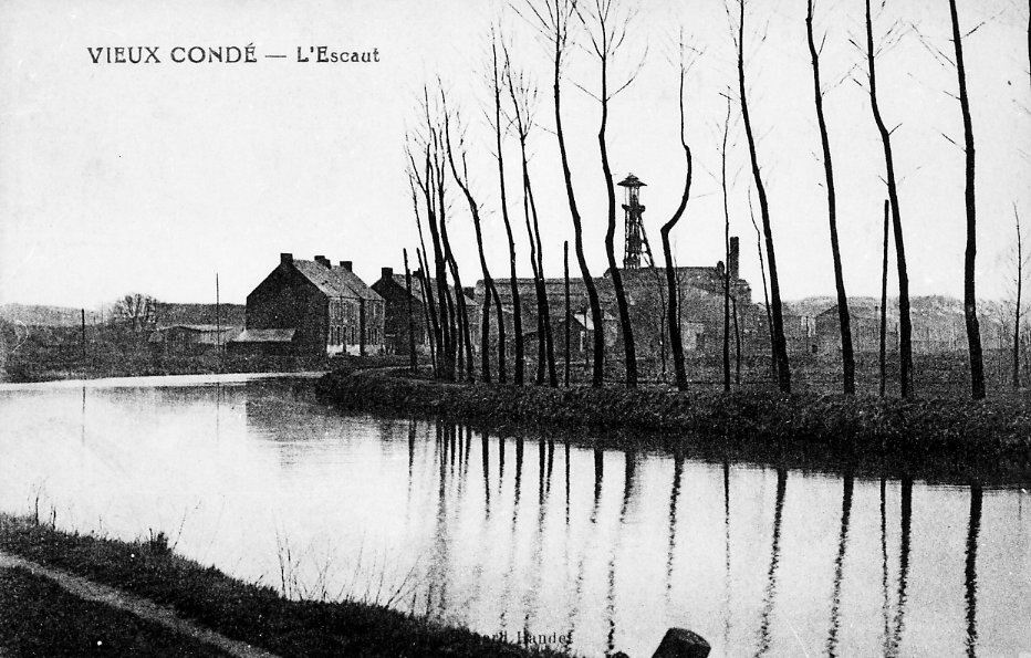 La fosse Vieux-Condé de la Compagnie des mines d'Anzin était un charbonnage constitué d'un seul puits situé à Vieux-Condé, Nord, Nord-Pas-de-Calais, France.